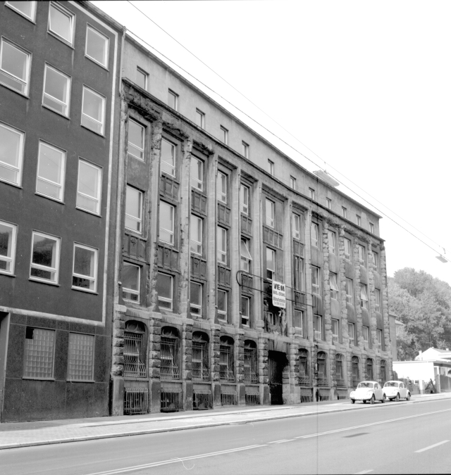 Straßenansicht des alten Happich Gebäudekomplexes am Neuenteich in Wuppertal, während der Abrissphase in 1979. Agfa Pan 100. Rollei SL 66